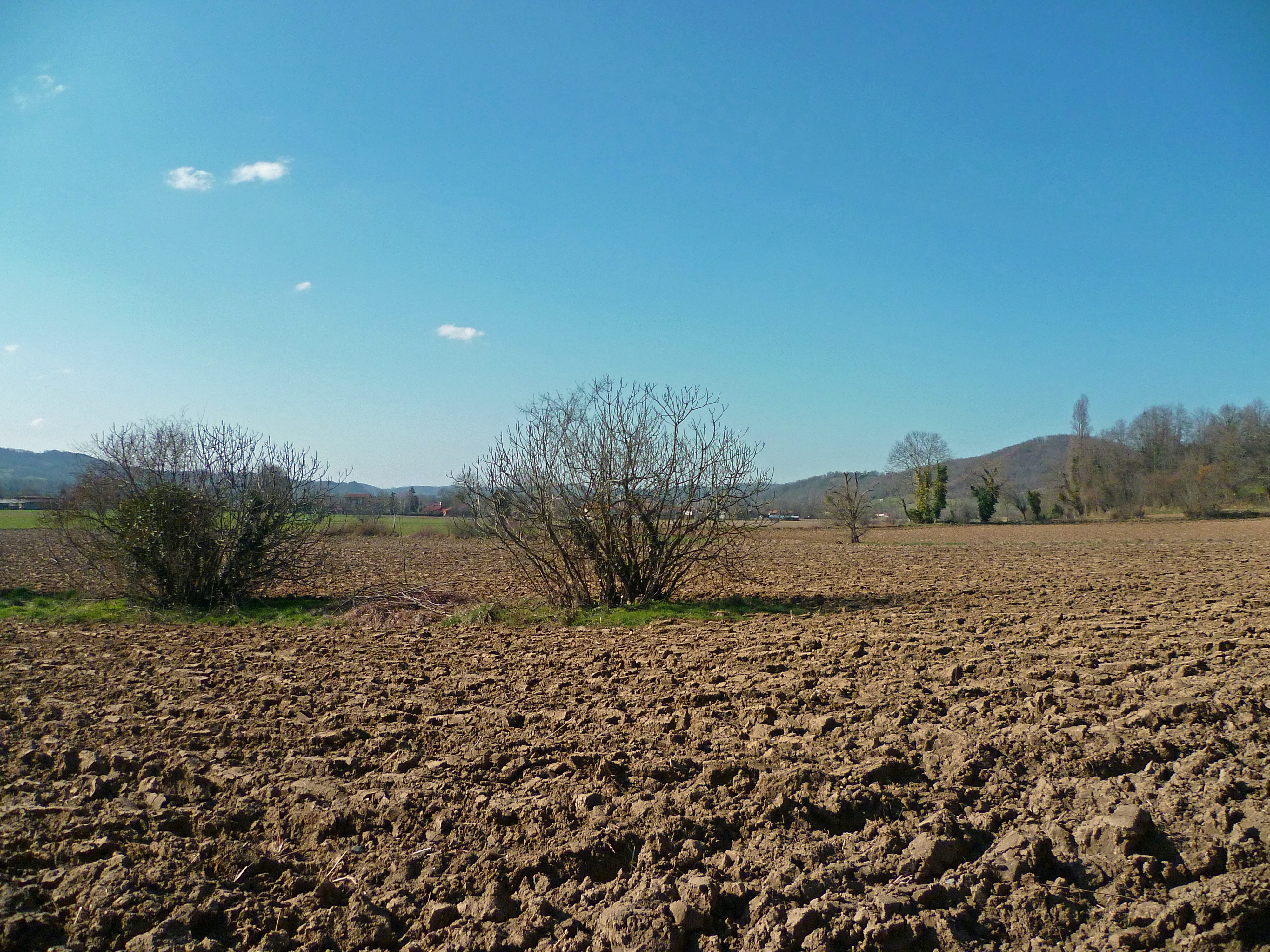 Gajan (Ariège, France) : Figuiers (Ficus carica) dans un champ labouré.